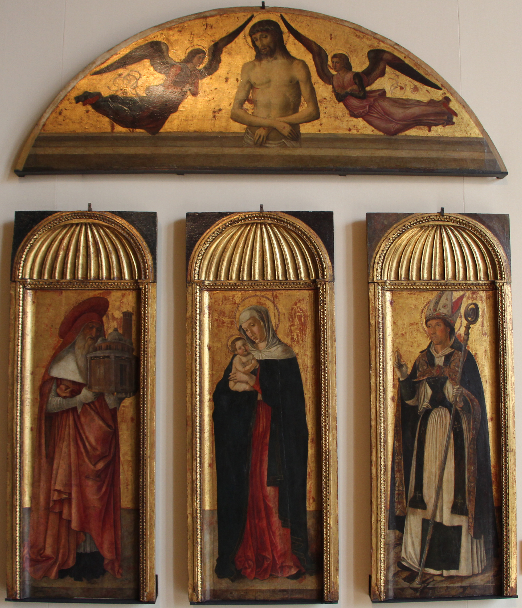 Gallerie dell'Accademia - MIBAC The making of this document was supported by Wikimedia CH. (Submit your project!) For all the files concerned, please see the category Supported by Wikimedia CH. This is a photo of a monument which is part of cultural heritage of Italy.